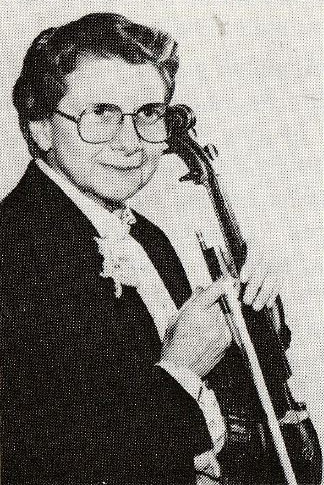 Vermes Mária (Budapest, 1923. november 23. – Budapest, 2018. január 10.) magyar hegedűművész és -tanár.